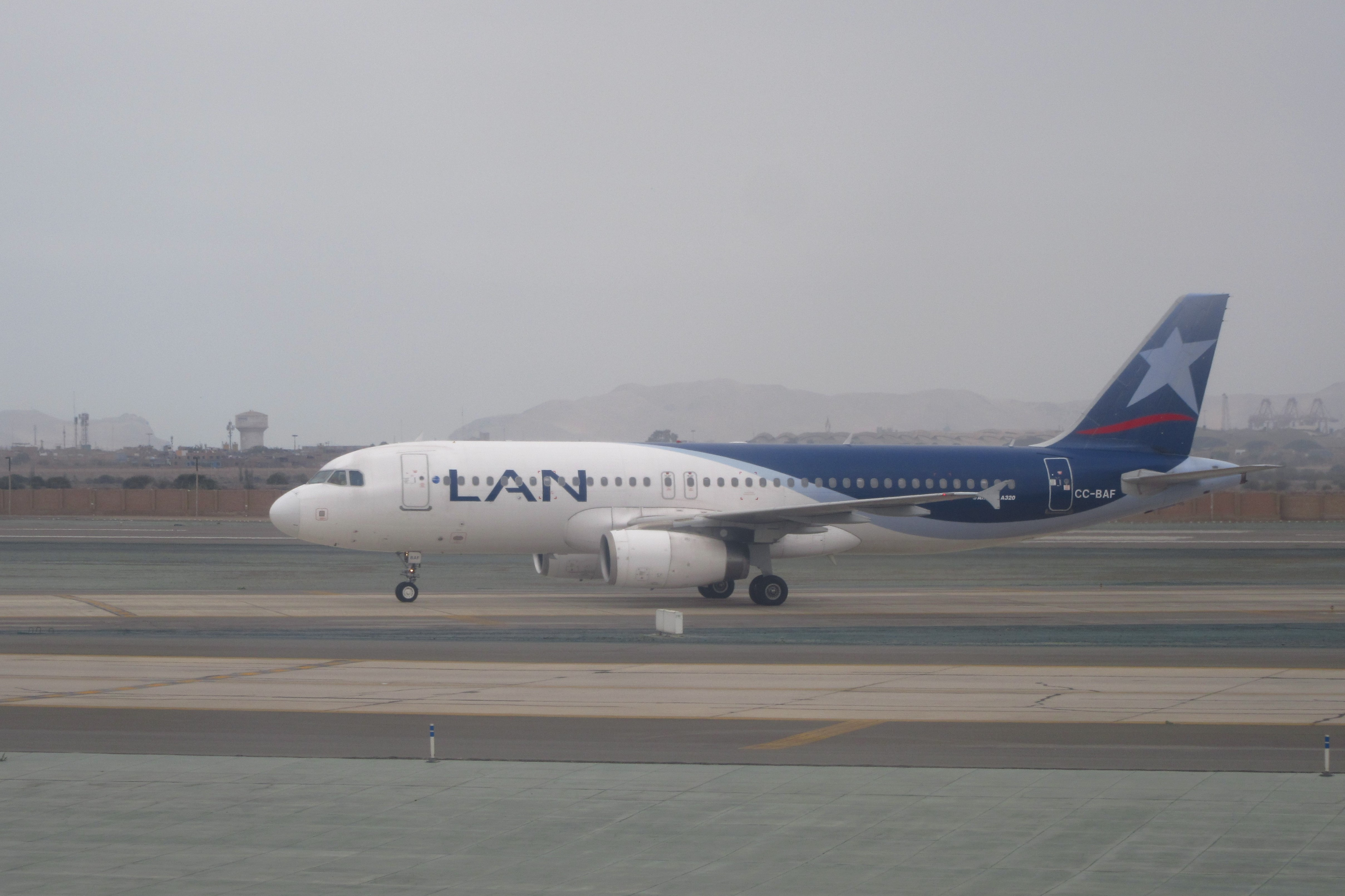 Avión de la aerolínea LAN en el aeropuerto de Lima.